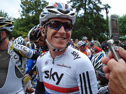 ファンのおじいちゃんに笑顔で応えるトーマス。